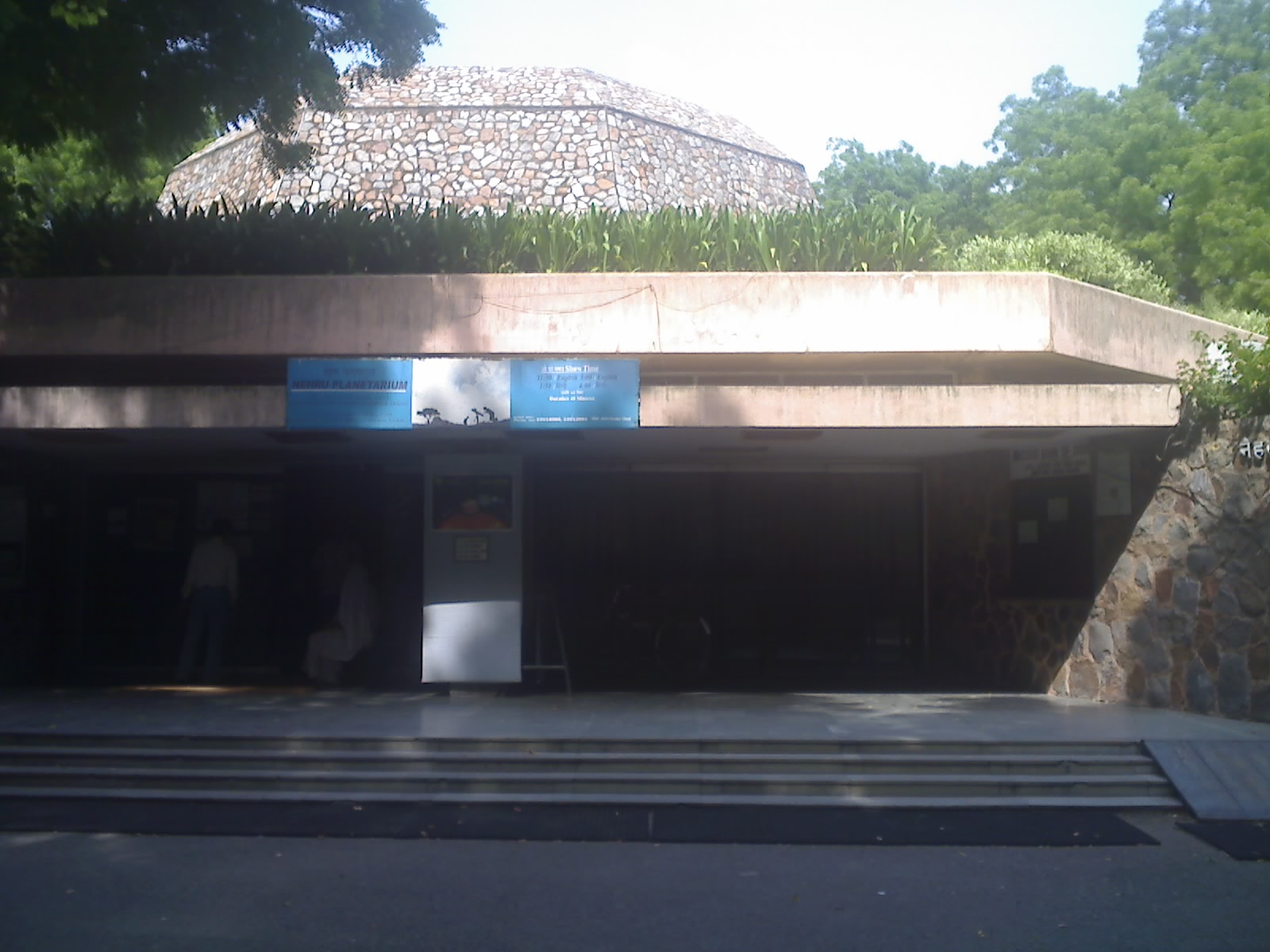 तारामंडल का द्वार